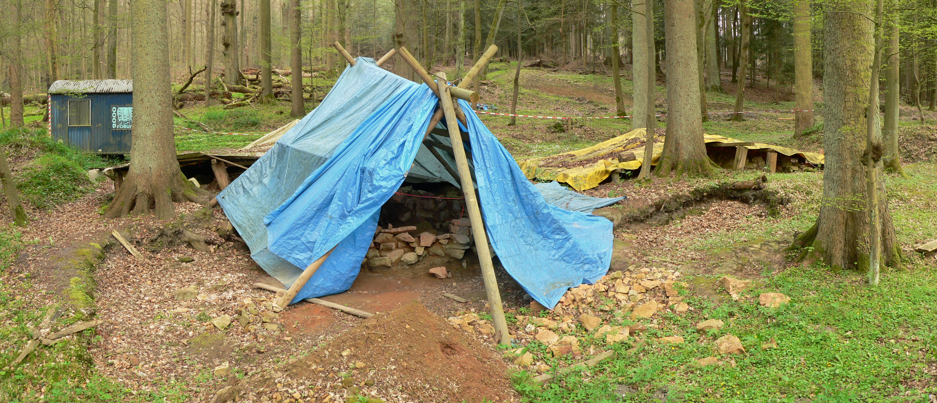 Ausgrabungsstelle Waldglashütte unter dem Hilsborn